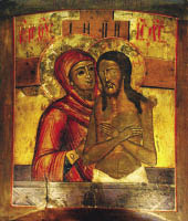 Гродзенскага музея гісторыі рэлігіі — "Не рыдай Мяне, Маці". Сярэдзіна XIX ст.